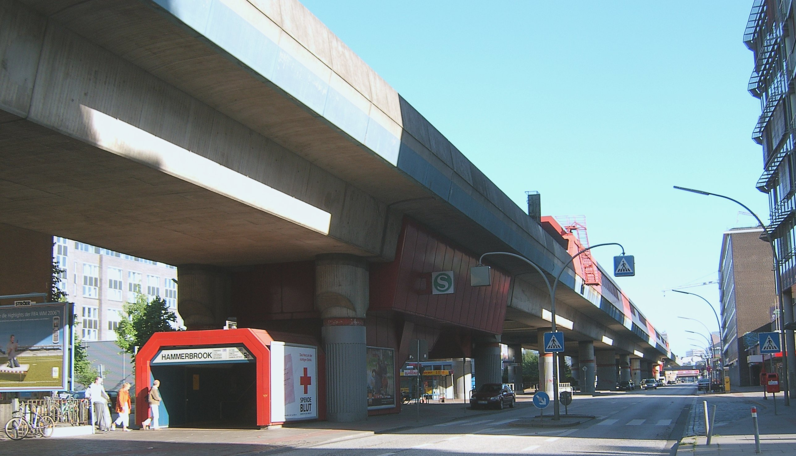 Eingang zum S-Bahnhof in Hammerbrook. Die Haltestelle wurde von 1978 bis 1983 von der Architektengemeinschaft Schramm, Pempelfort, von Bassewitz und Hupertz errichtet und stellt einen Zug bei schneller Fahrt dar.